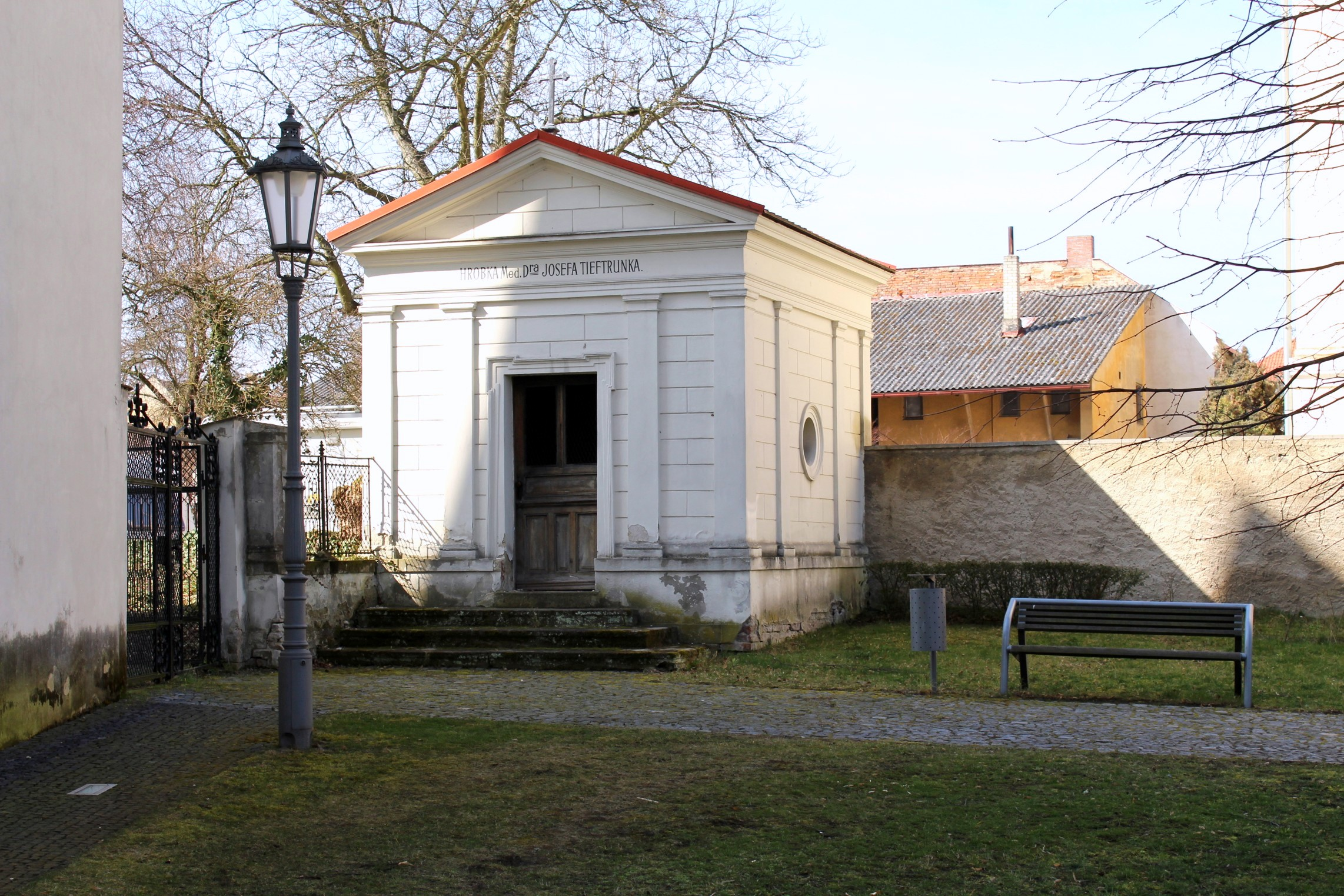 Bělá, kostel Povýšení sv. Kříže